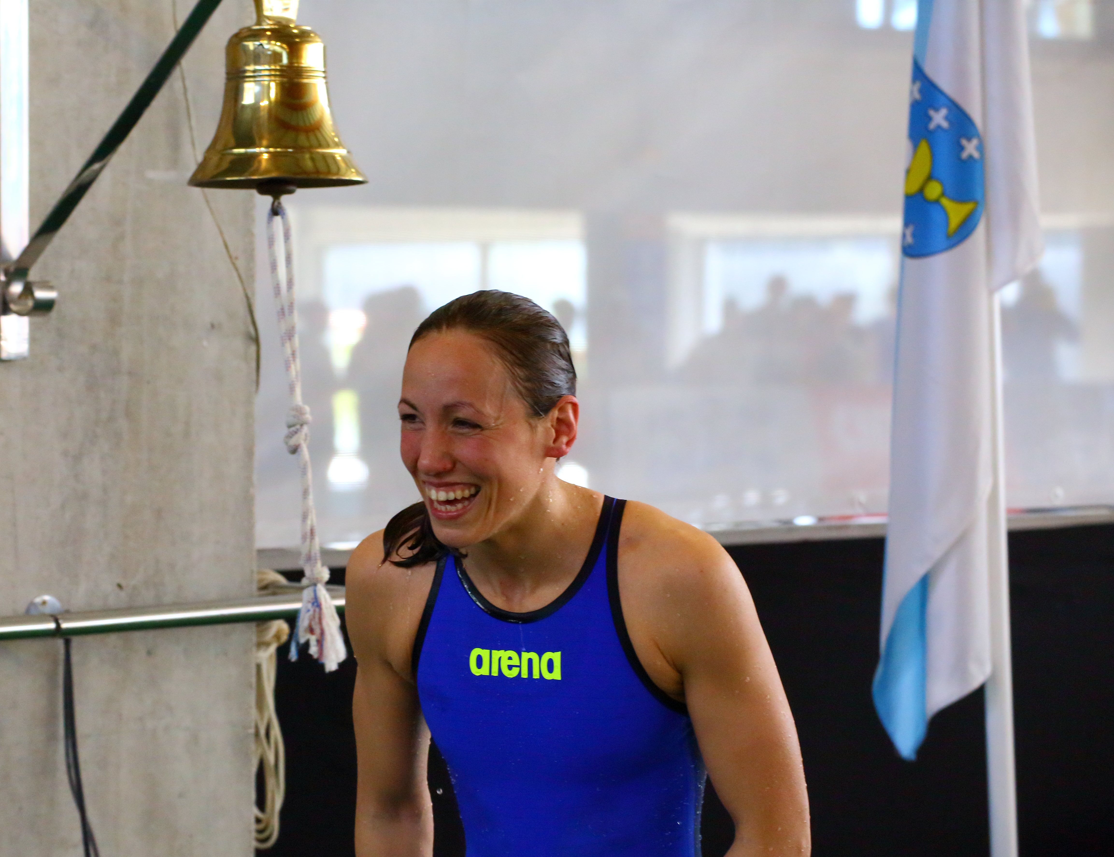 Momento del récord nacional, en la segunda sesión de la primera jornada